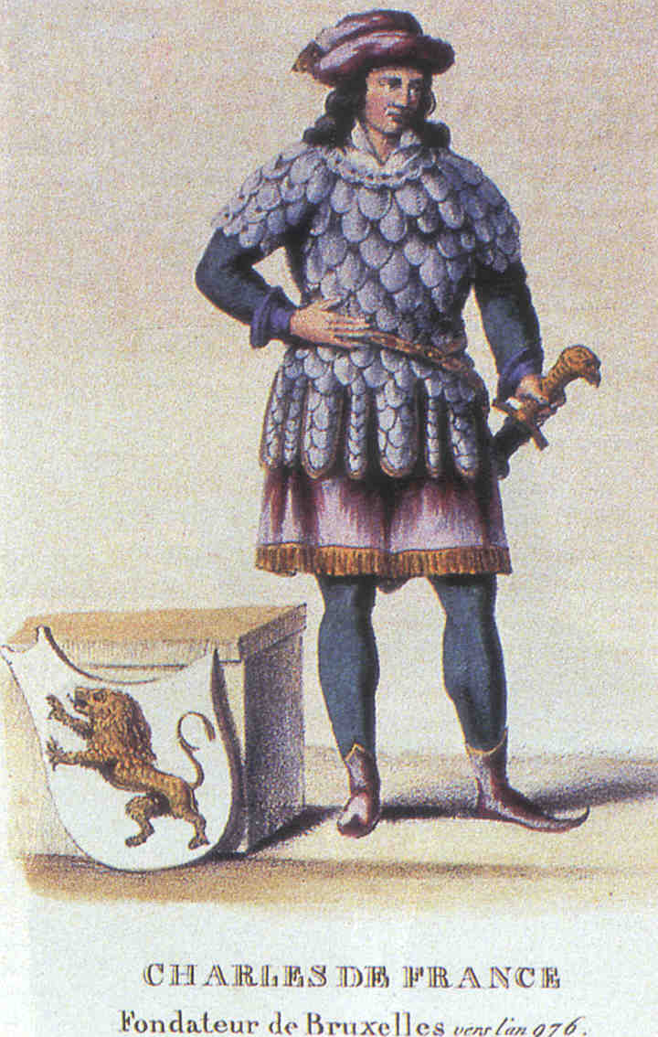 Charles de France, fondateur de Bruxelles, d'après une lithographie romantique vers 1850.